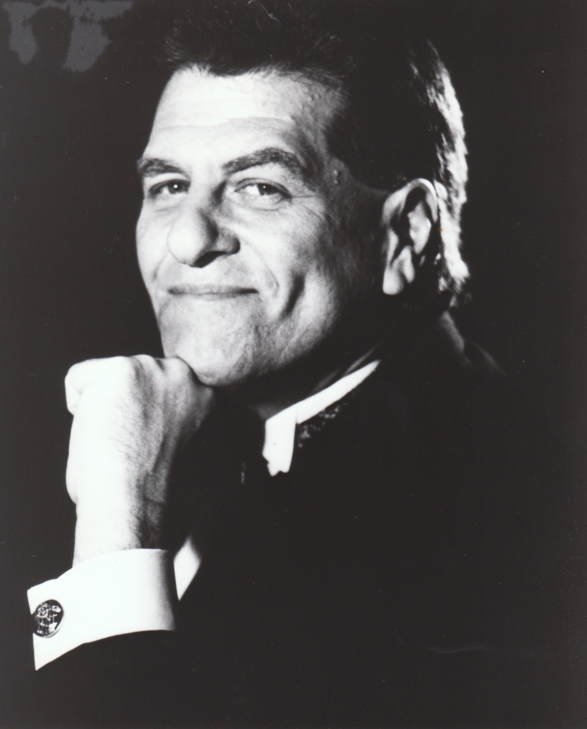 Len Barry